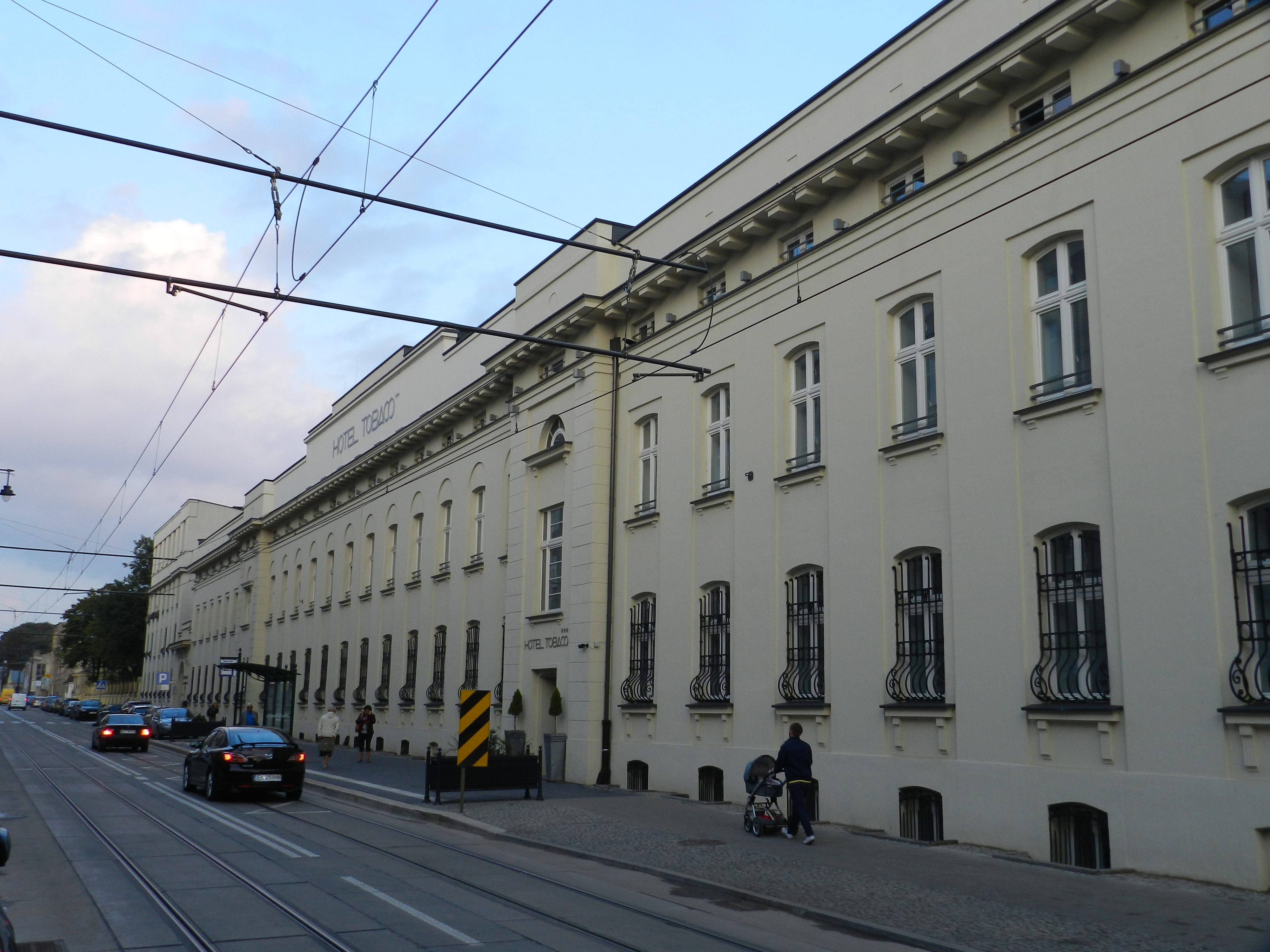 Łódź, fabryka Państwowego Monopolu Tytoniowego (ob. hotel), kon. XIX, 1927